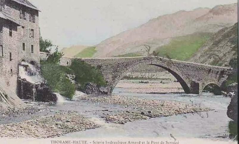 Thorame-Haute Scierie et pont